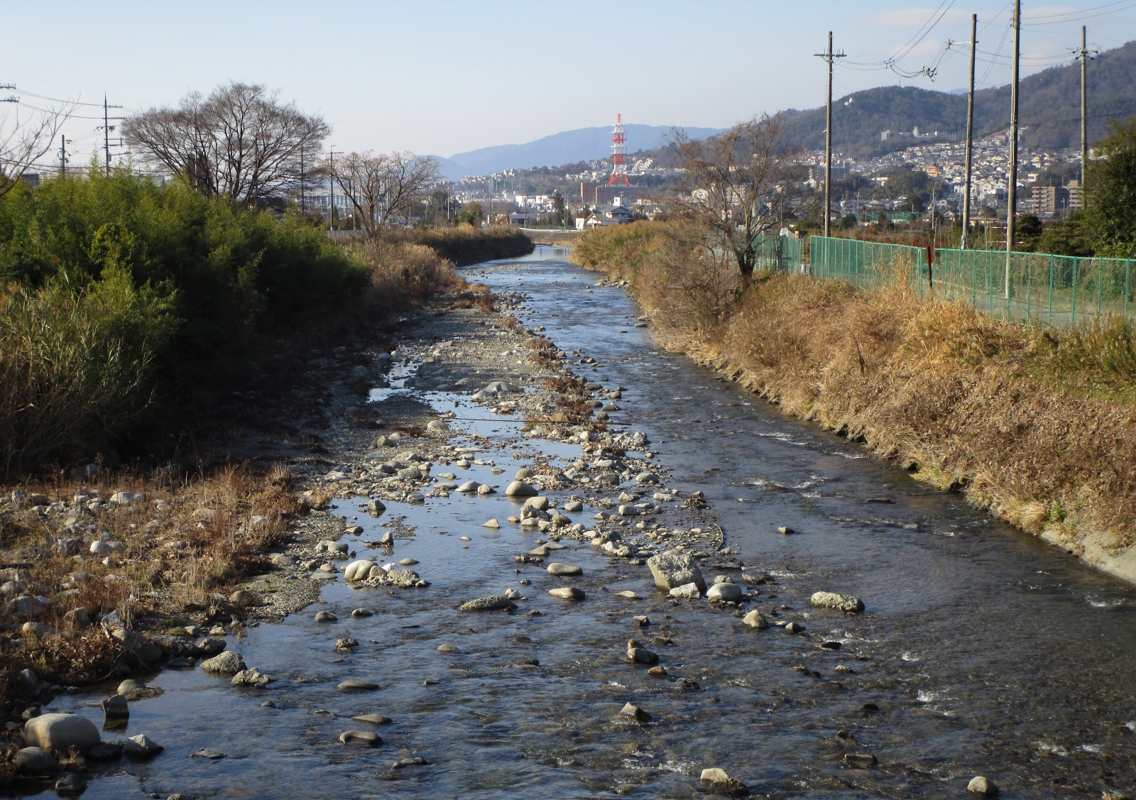 余野川（大阪府池田市、高橋より撮影）